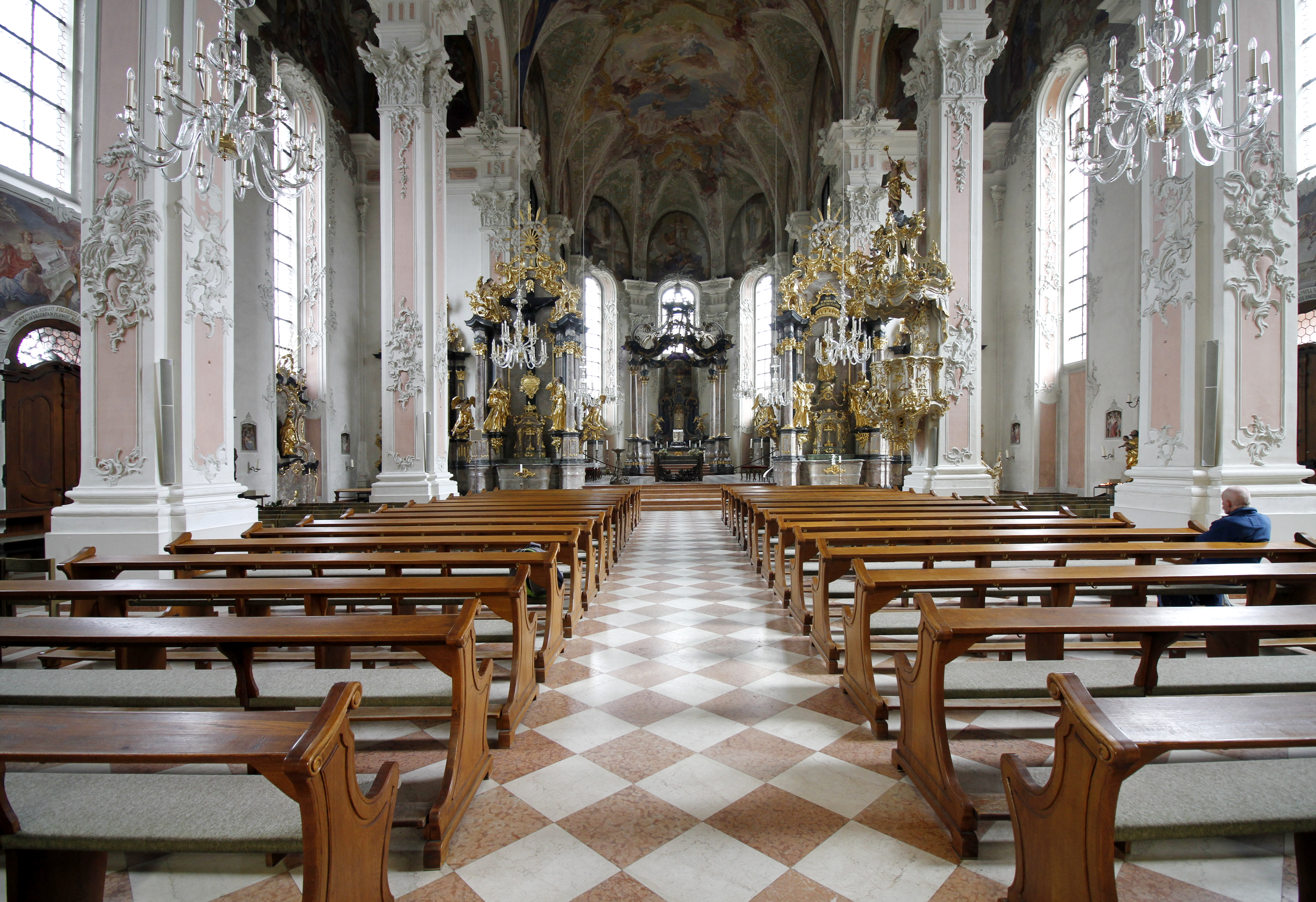 St. Peter - Mainz - Germany